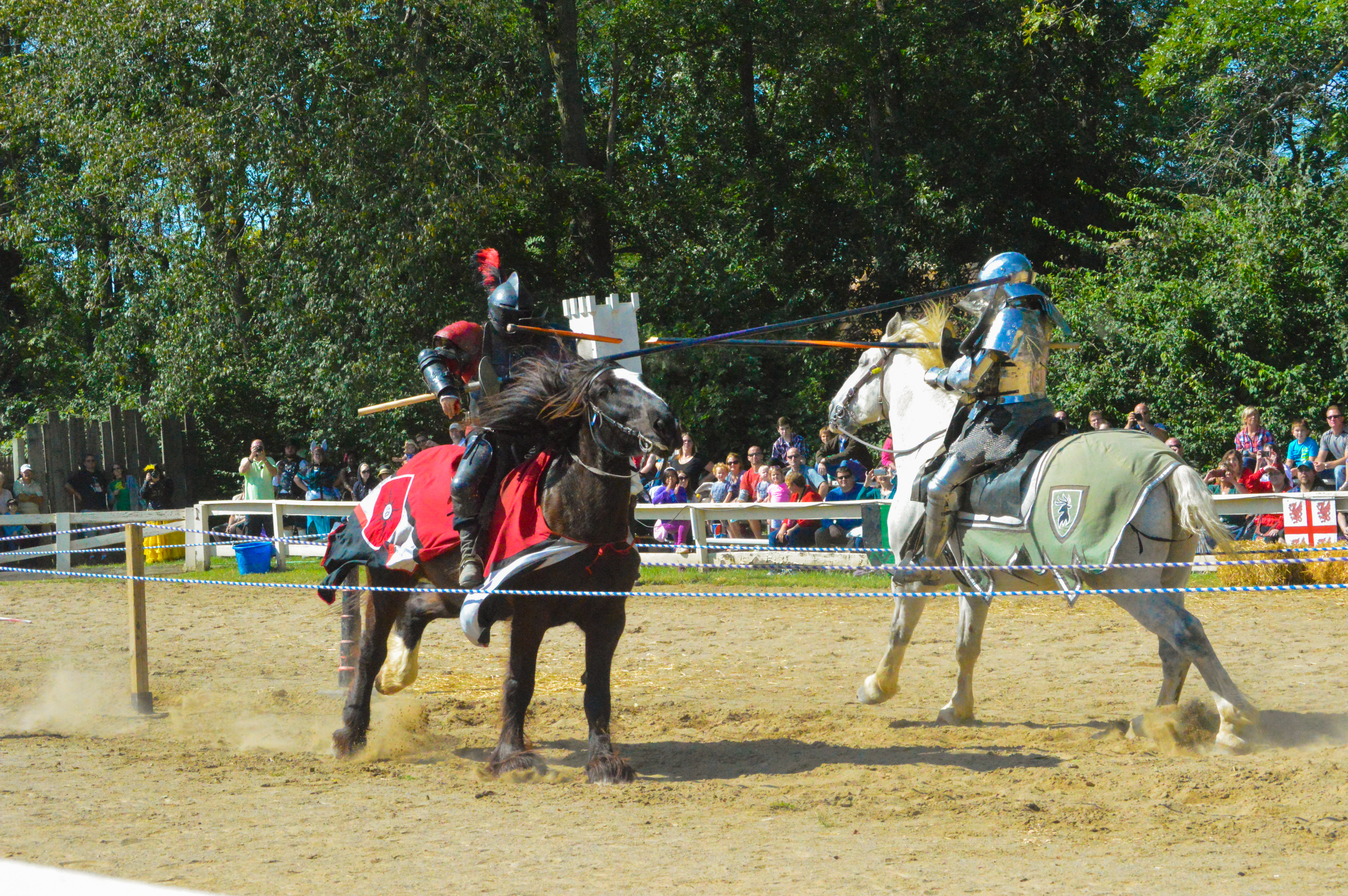 Ohio Renaissance Festival 9-14-2014